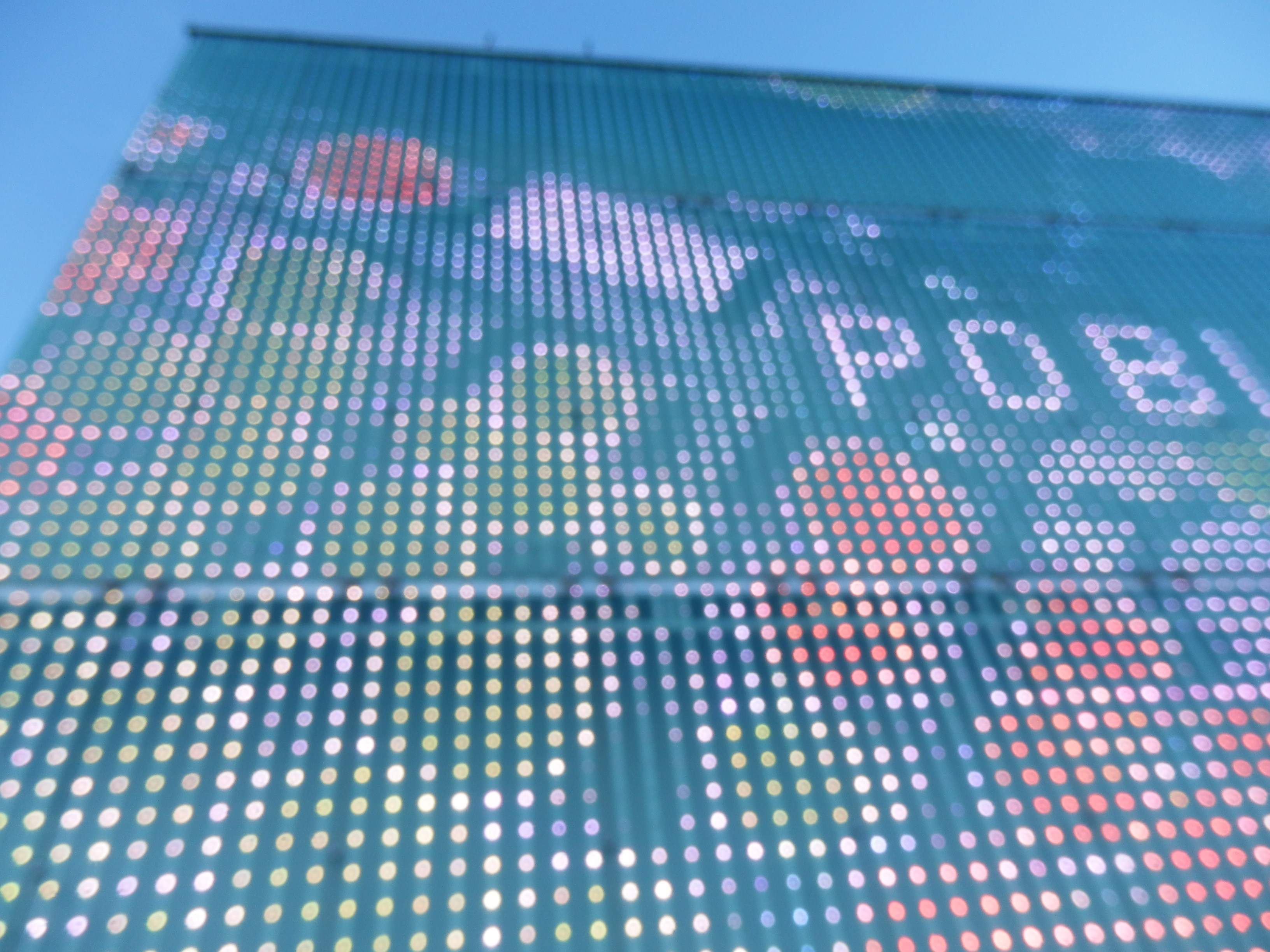 Etopia en la Milla Digital de Zaragoza.